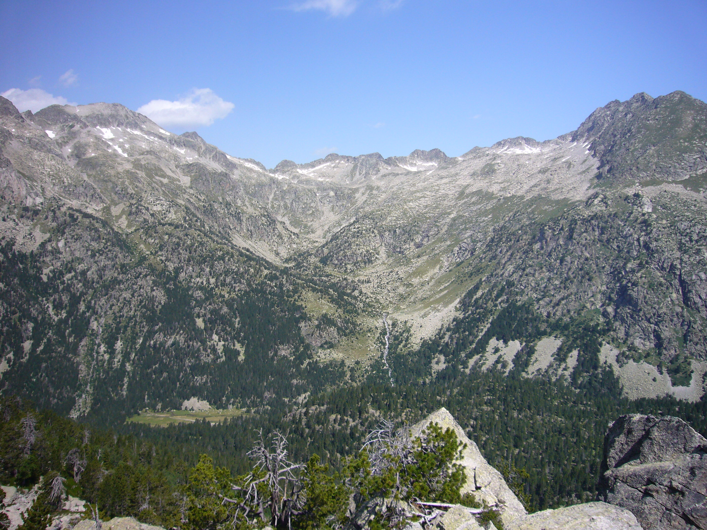 Vall de Contraix vist des del Vall de les Corticelles; la Vall de Boí, Alta Ribagorça, Catalunya